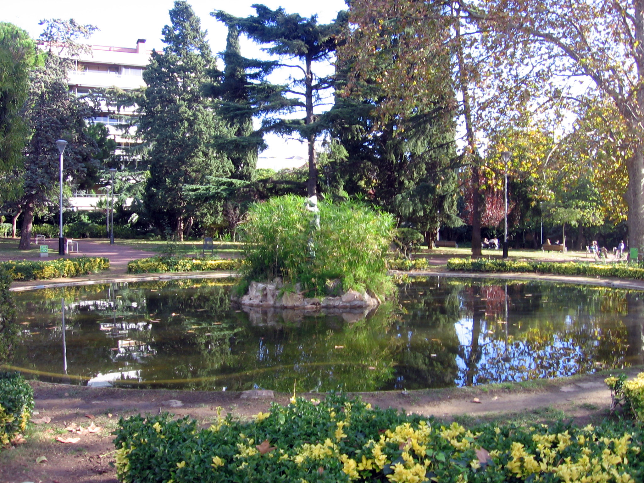 Jardines de Villa Amelia.